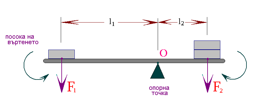 двустранен лост